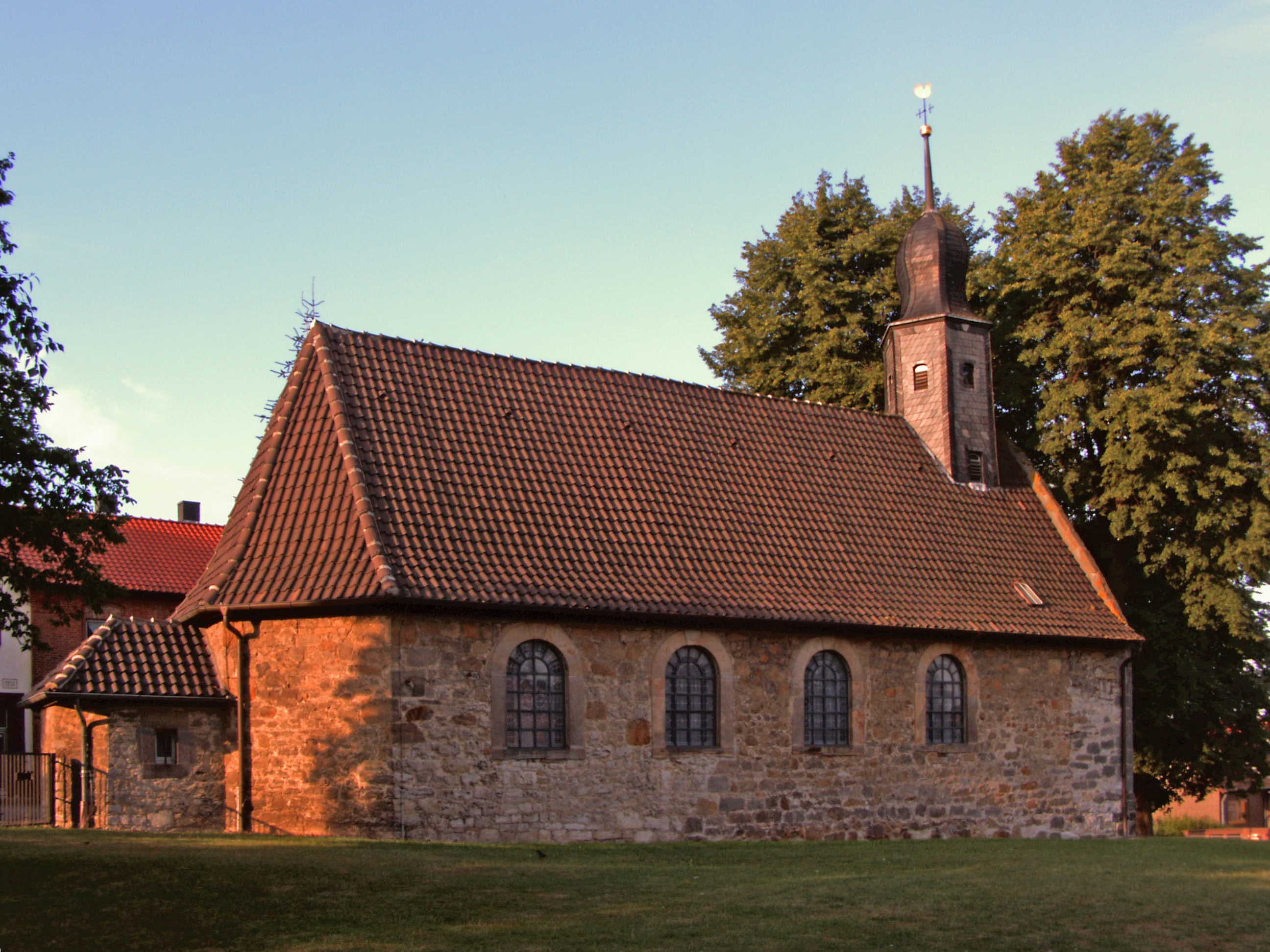 Katholische Kirche St. Catharina in Asel, Ortsteil von Harsum